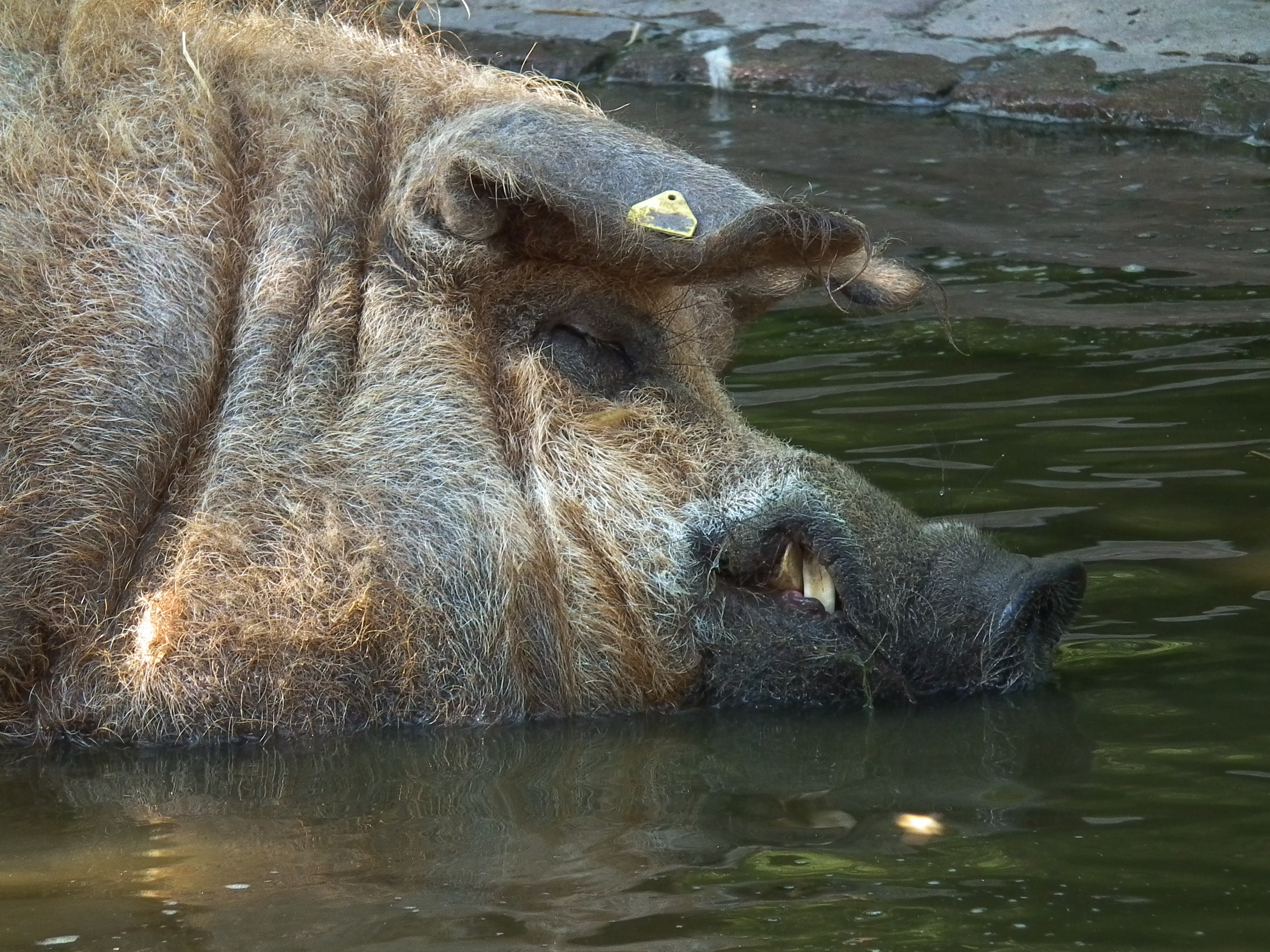 Magalitza-Schwein (Wollschwein), fotografiert im Herzogenriedpark in Mannheim (Baden-Württemberg, Deutschland)